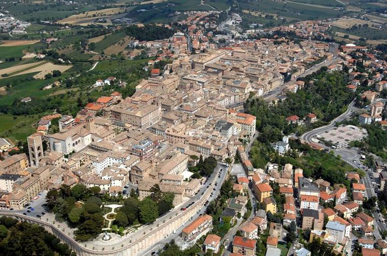 Панорамен изглед от град Озимо